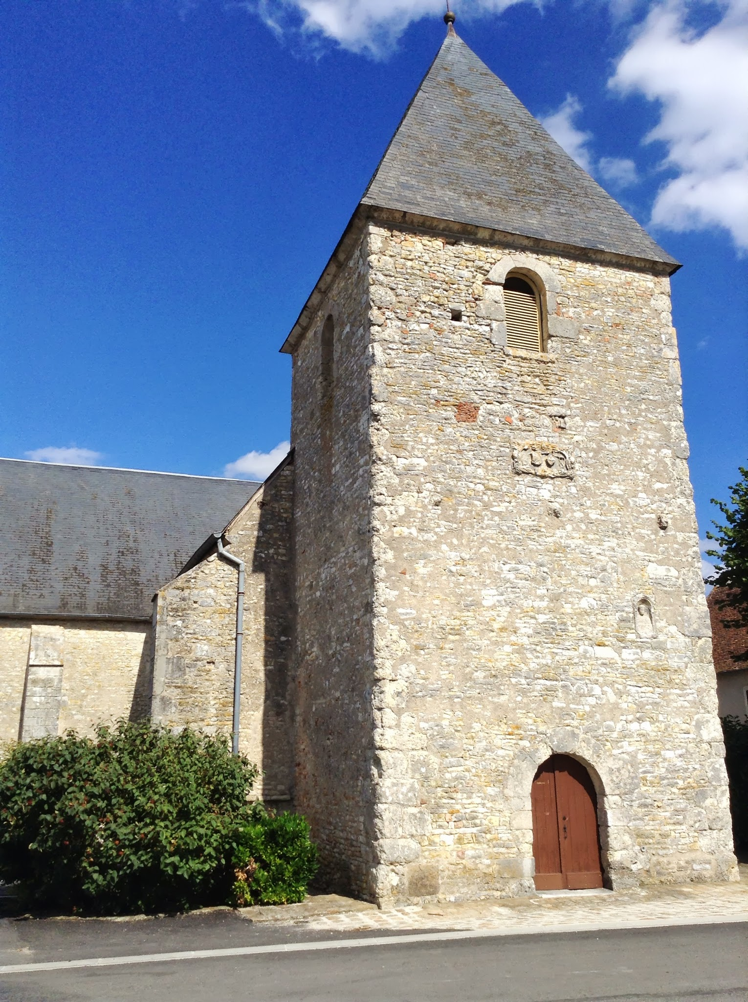 Collégiale Saint-Pierre, Venesmes, Cher